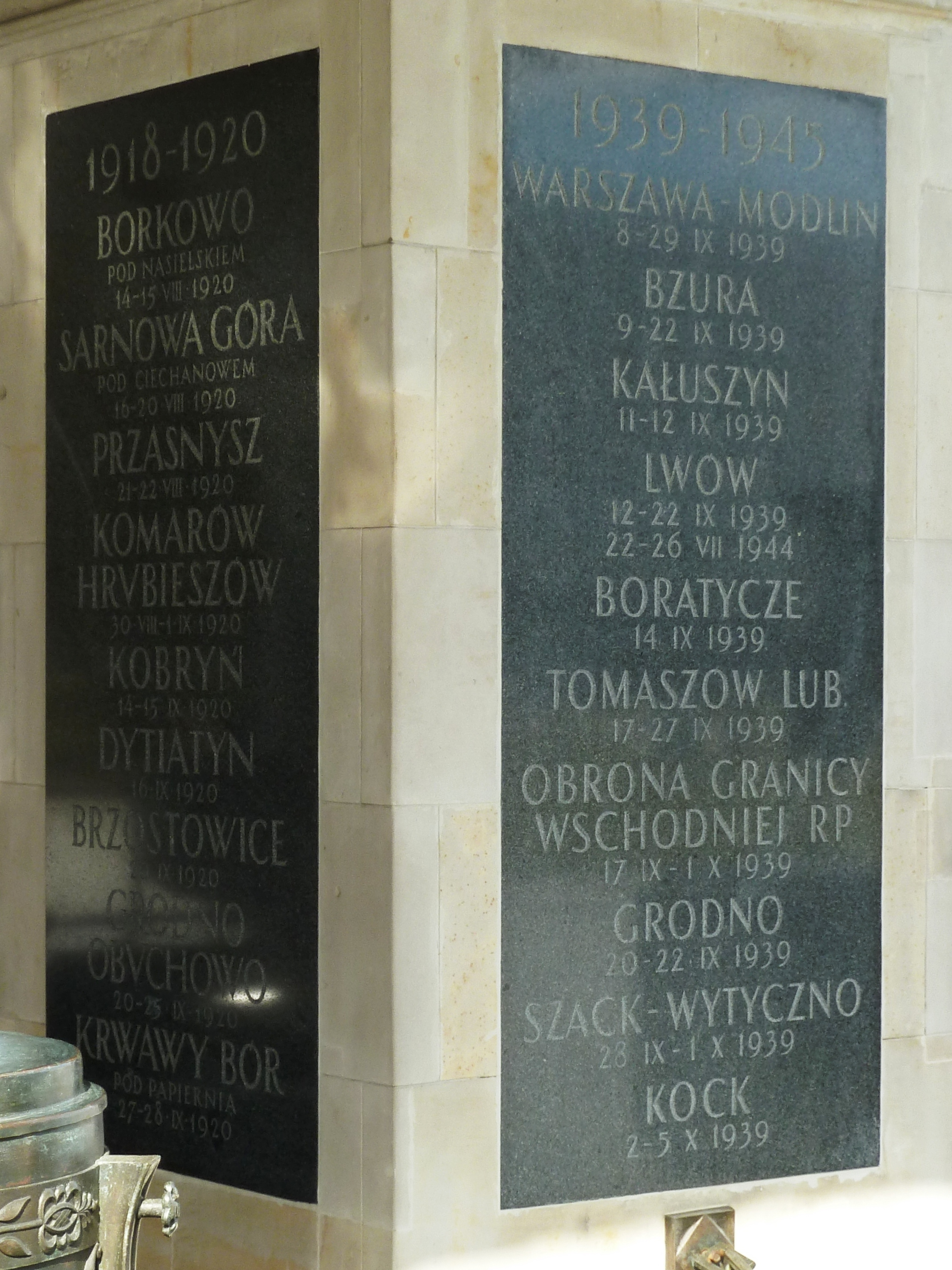 Grób Nieznanego Żołnierza w Warszawie - tablica upamiętniająca miejsca walk w 1939 r., w tym obronę granicy wschodniej RP